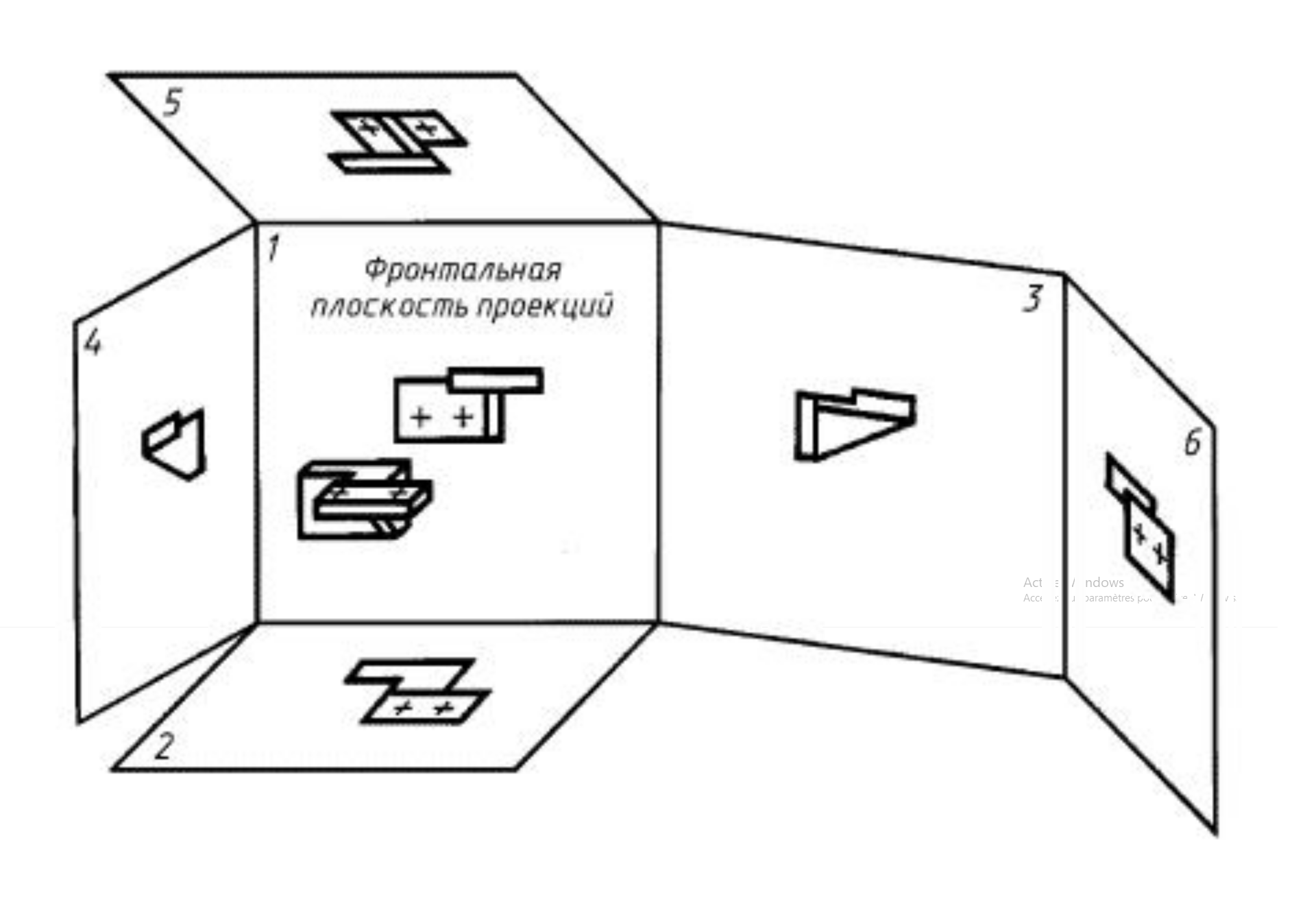 Images of the object in the method of rectangular projection drawing. Изображения предмета на чертеже по методу прямоугольного проецирования.